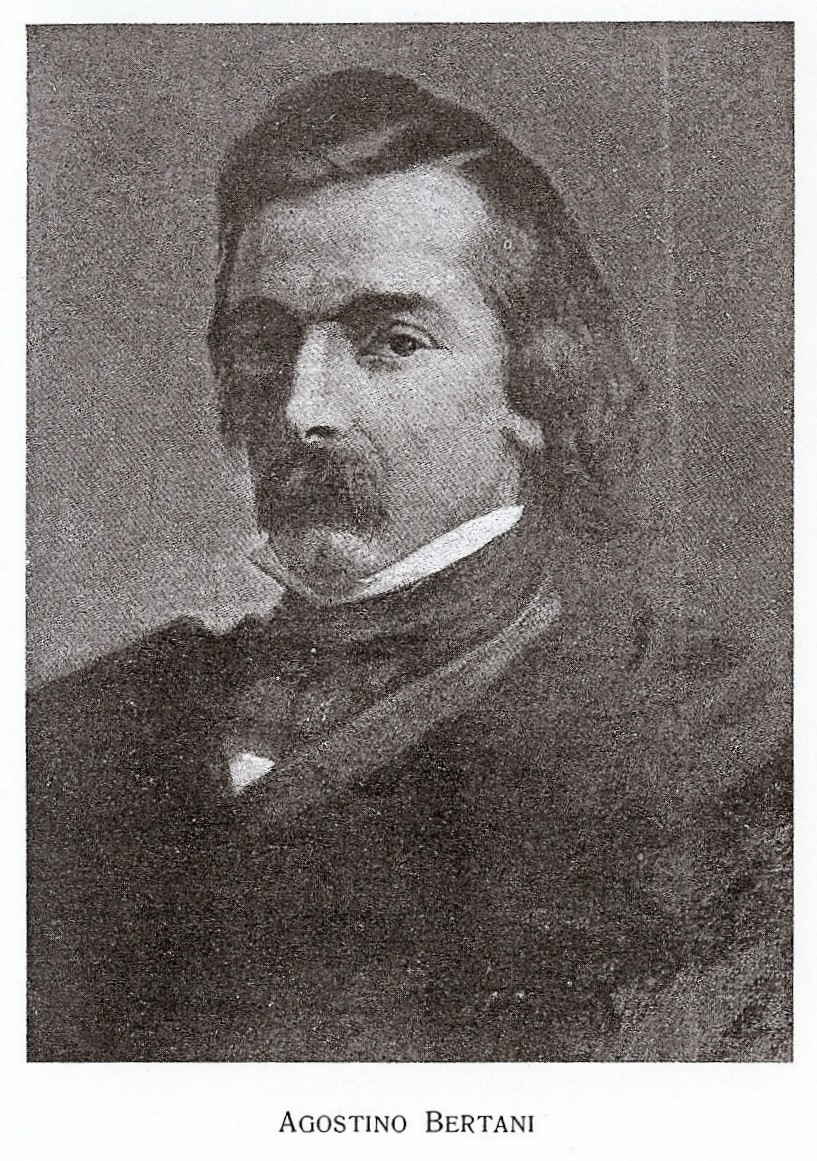 Agostino Bertani La foto si trova nel libro di Jack la Bolina: Tre garibaldini-Ippolito Nievo, Rosalino Pilo, Agostino Bertani stampato a cura dell'Istituto Italiano del popolo a Milano nel 1924